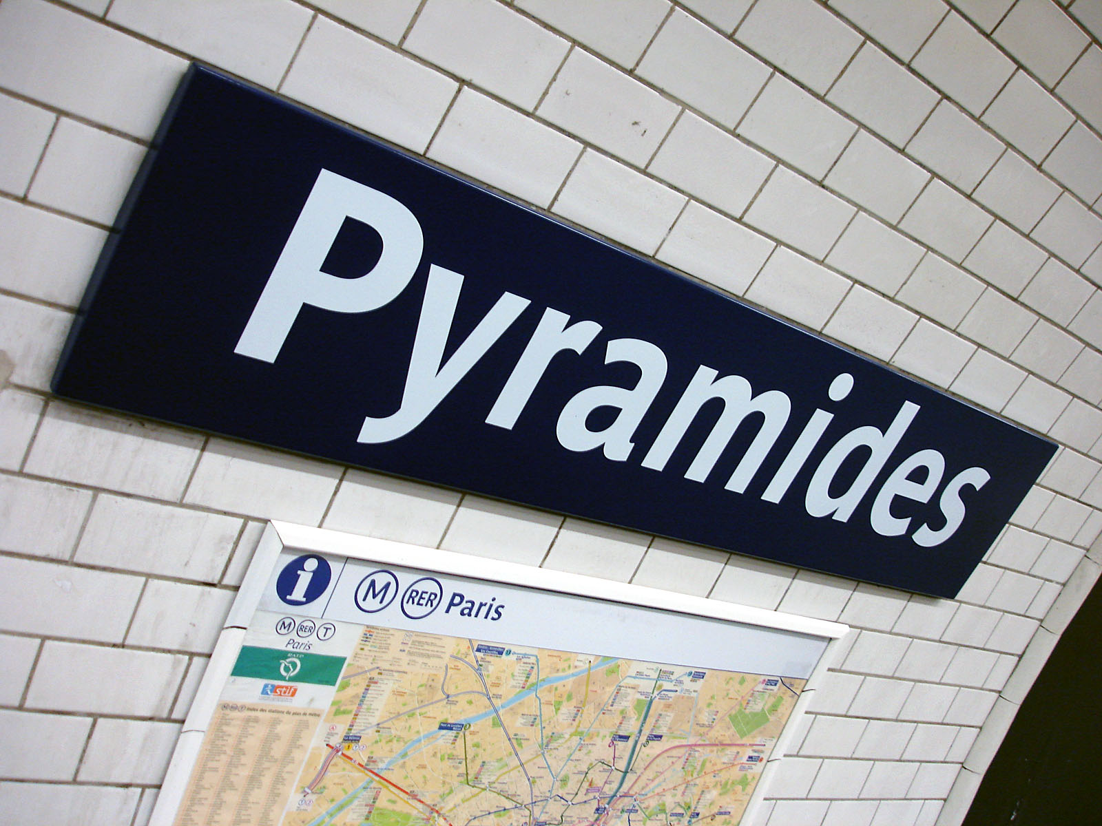 La station Pyramides de la ligne 7 du métro de Paris, France.